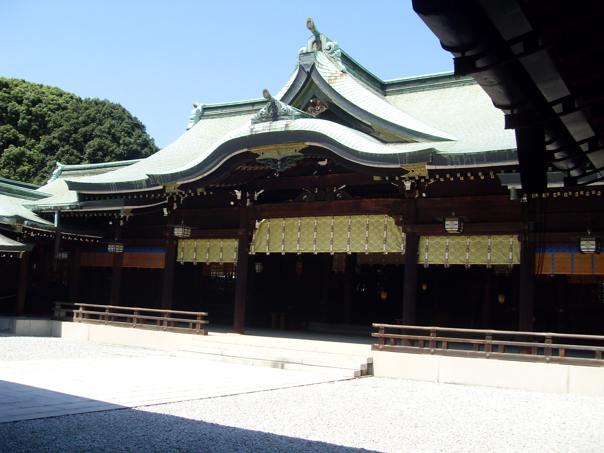 Meiji-jingu Shinto shrine , Japan